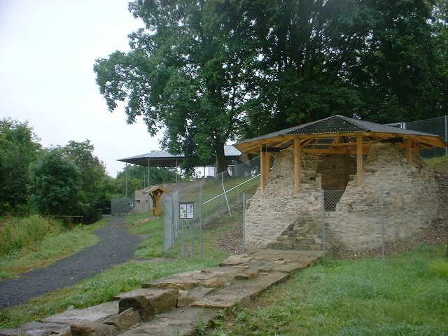 Rodenberg — Freilichtmuseum, Rondel und Bastei.